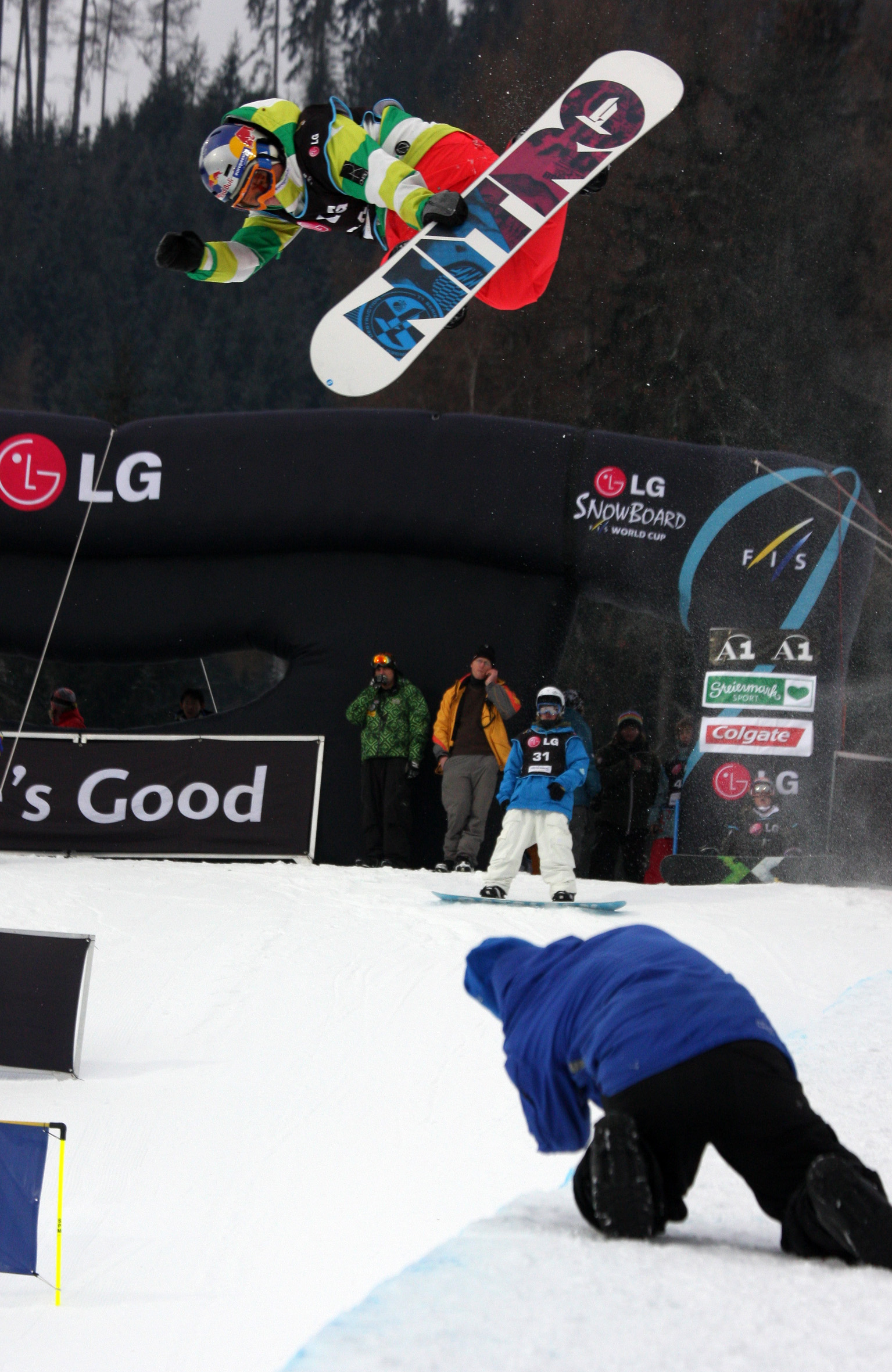 Kreischberg_HP_Dimi_de_Jong_NED_03